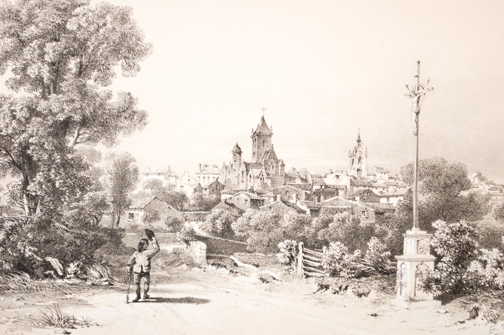 Vue de Légé